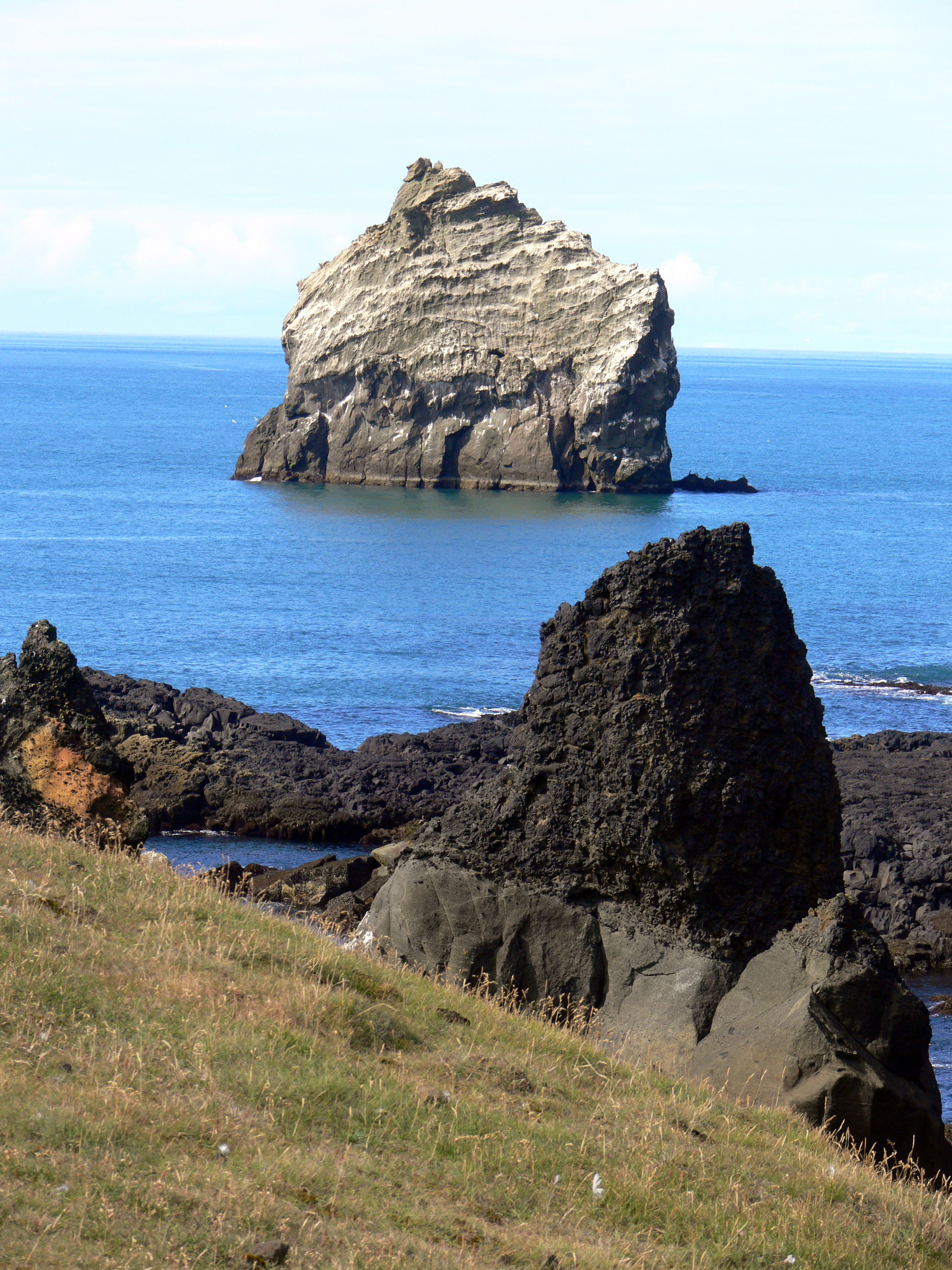 Reykjanestá, der Felsen "Karl"